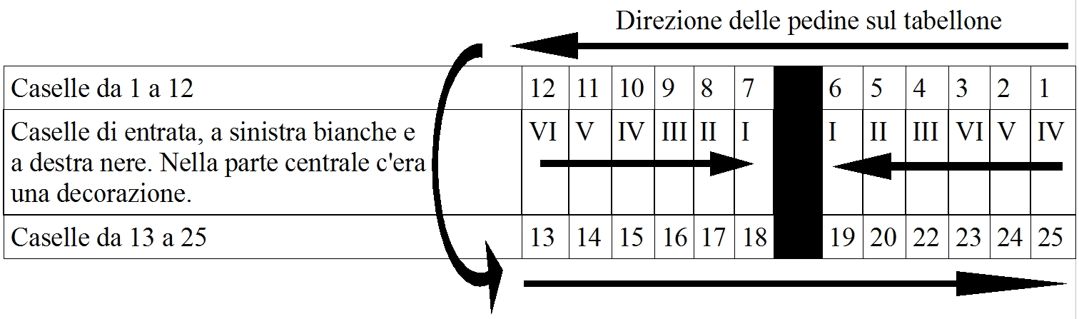 Tabellone del gioco "duodecim scripta"